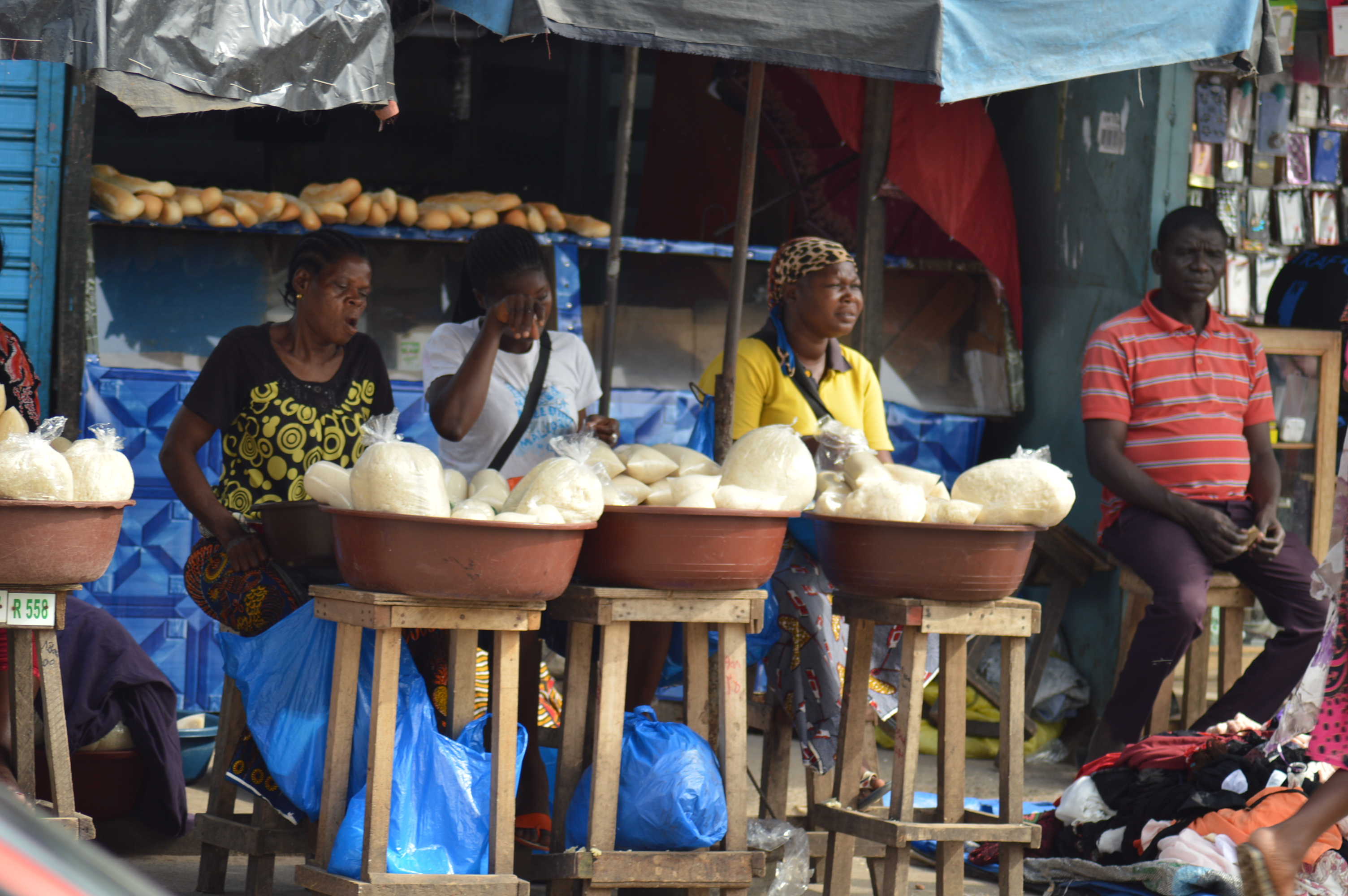 Vendeuse d'Attiéké au Marché Cocovico de cocody This is an image of "African people at work" from Ivory Coast